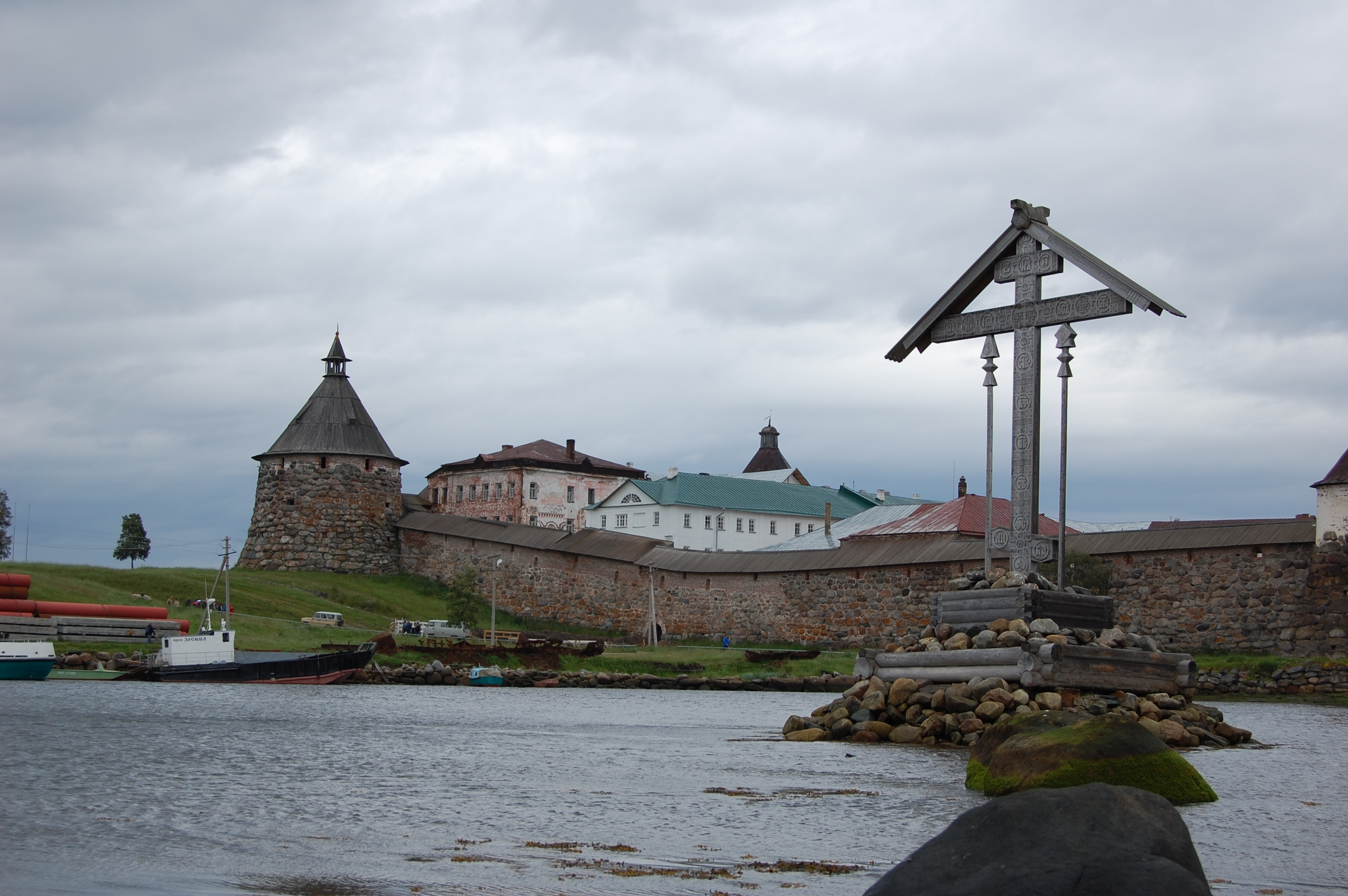 Корожная башня Соловецкого кремля и поклонный крест в гавани Благополучия. Вид с Сельдяного мыса.